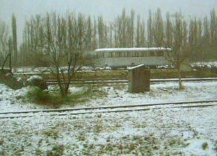 HŽ "Šinobus" unit